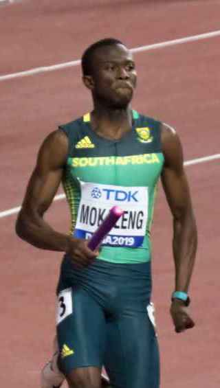 DOH80416 4x400m men heats kevin borlée